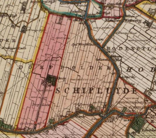 Dorppolder.